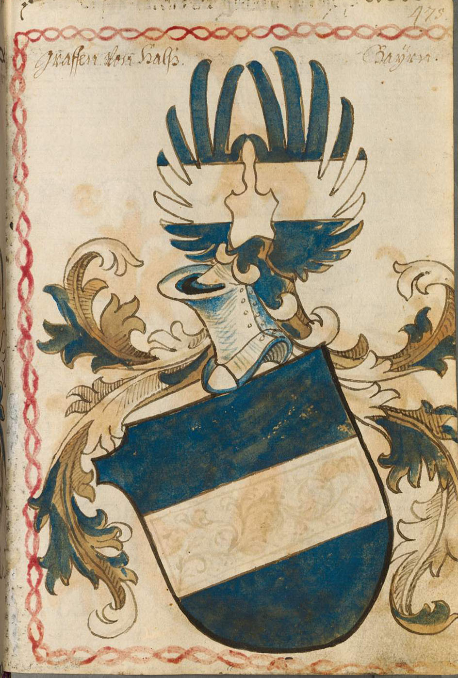 Scheibler'sches Wappenbuch , älterer Teil; Seite 475 Graffen von Halß Bayern